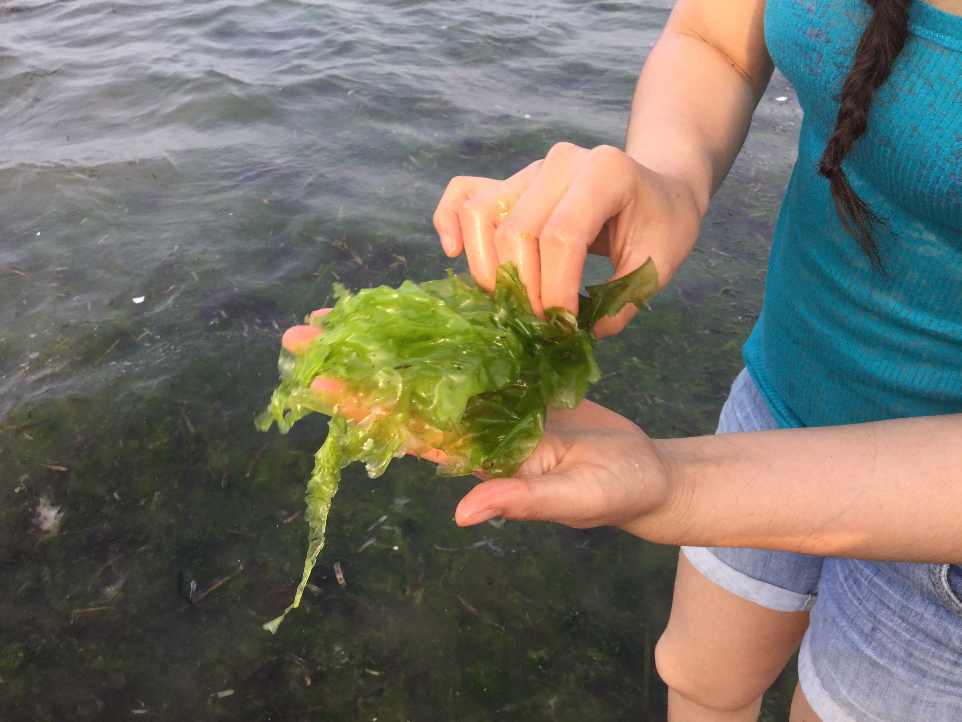 Ulva sp. comúnmente conocida como "lechuga de mar" es una alga perteneciente a Clorophyta.